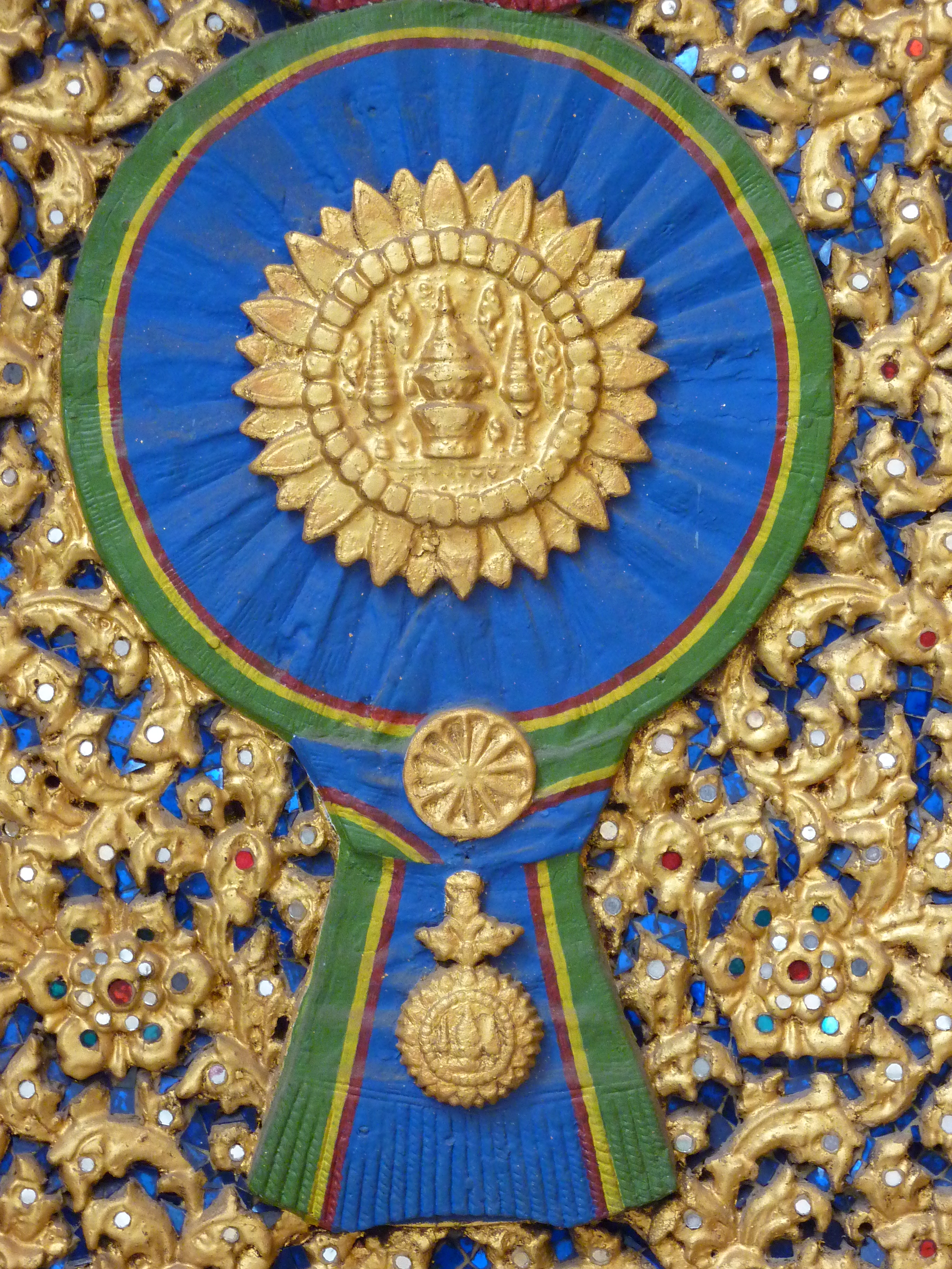 27 Badge, Wat Ratchabophit, Bangkok